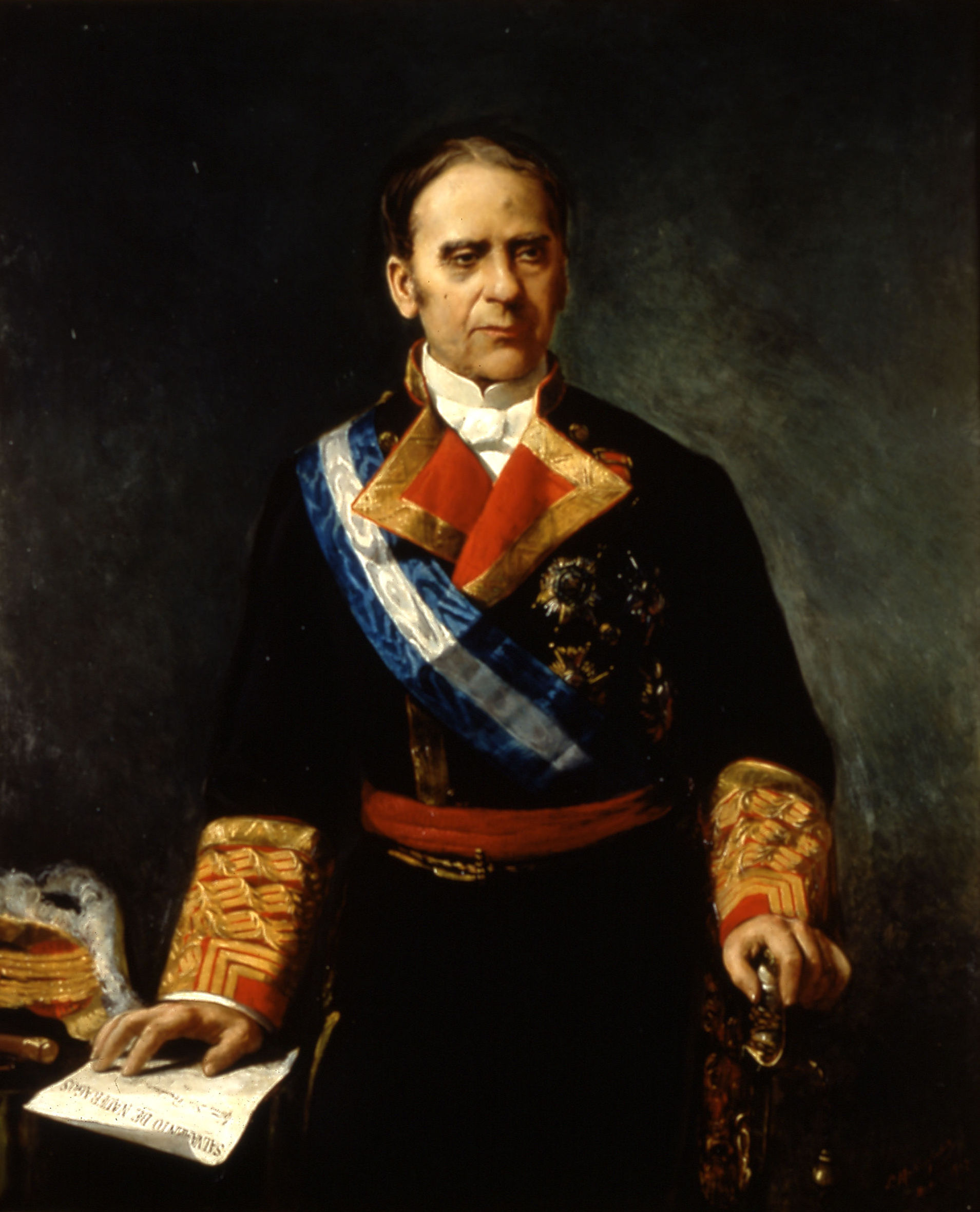 Retrato de Gutiérrez de Rubalcava